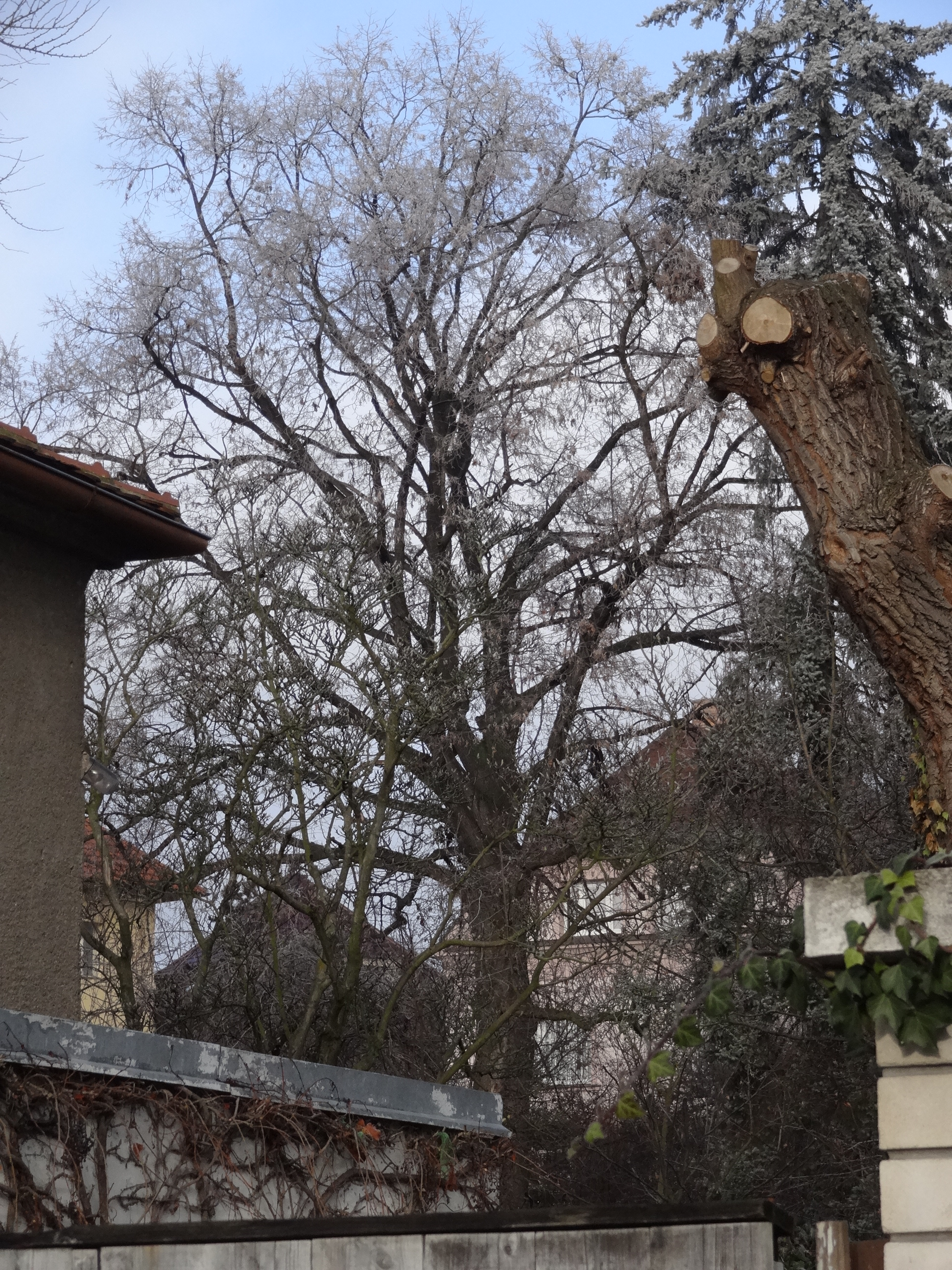 Krč - památná Lípa republiky v zahradách mezi ul. Ševce Matouše a Krčská